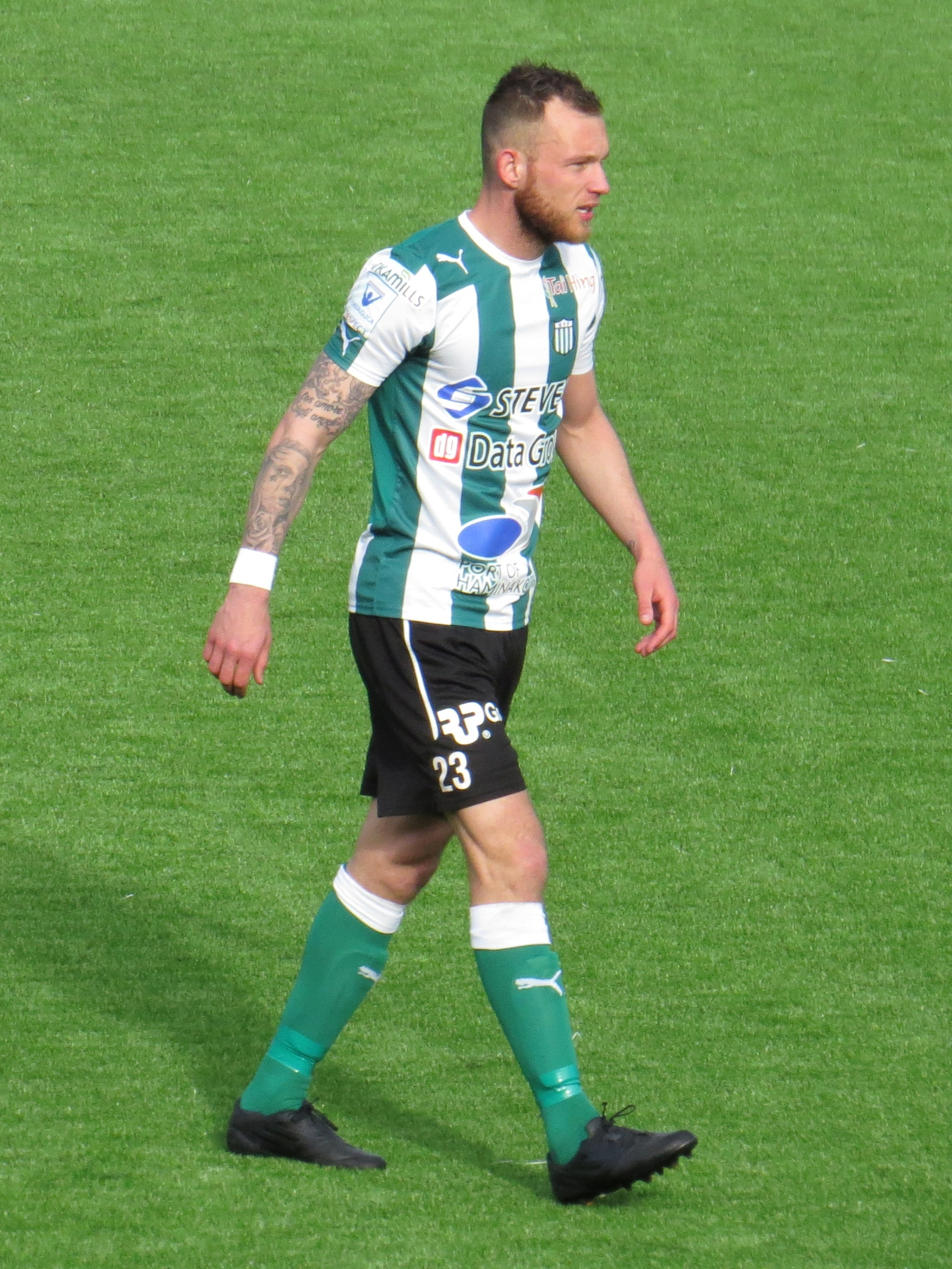 Alankomaalainen jalkapalloilija Jordi van Gelderen FC KTP:n paidassa kaudella 2015.